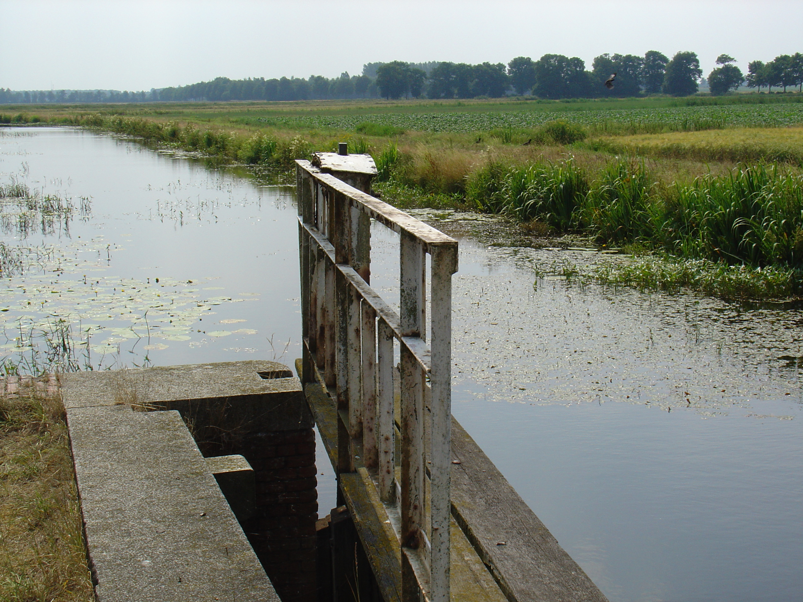 Kanaal Buinen-Schoonoord in de omgeving van Bronneger Categorie:Afbeelding Drenthe